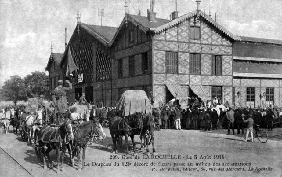 Le premier bâtiment de la gare La Rochelle-Ville, vu en 1914